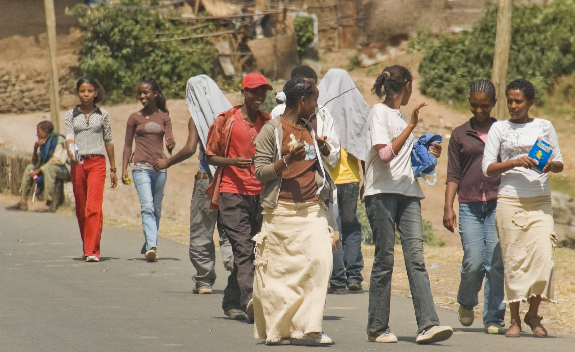 Gondar, Ethiopia.